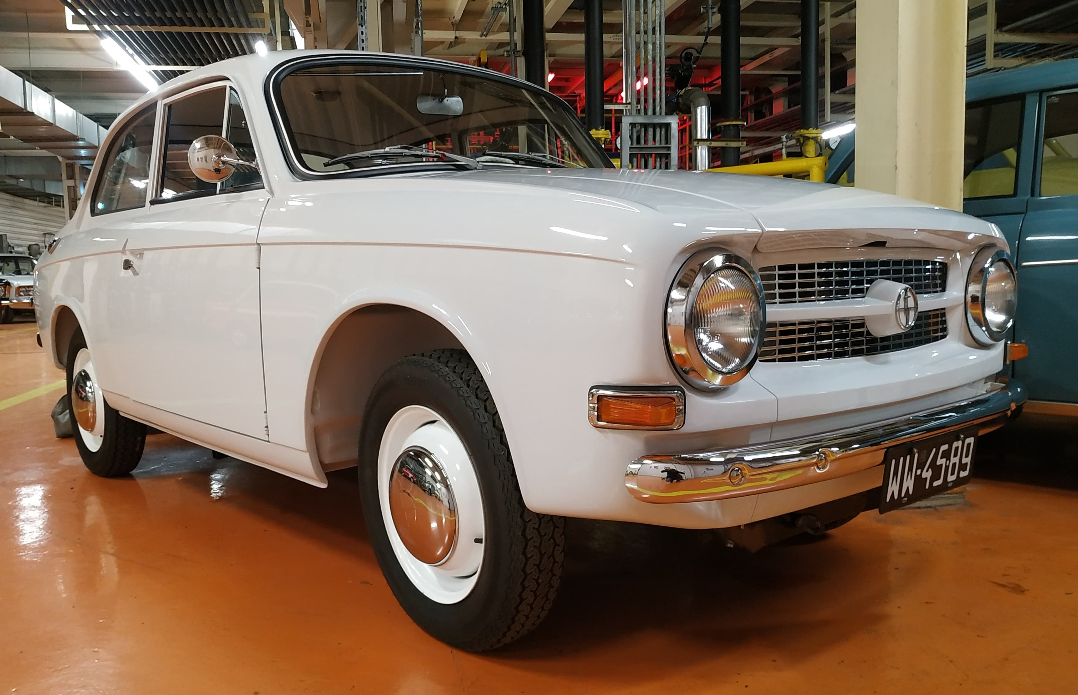 Czwarty egzemplarz prototypowy samochodu FSO Syrena "projekt 316/66", tzw. Syrena Laminat. Użytkownikiem auta do końca życia był pierwszy główny konstruktor FSO, inż. Karol Pionnier.